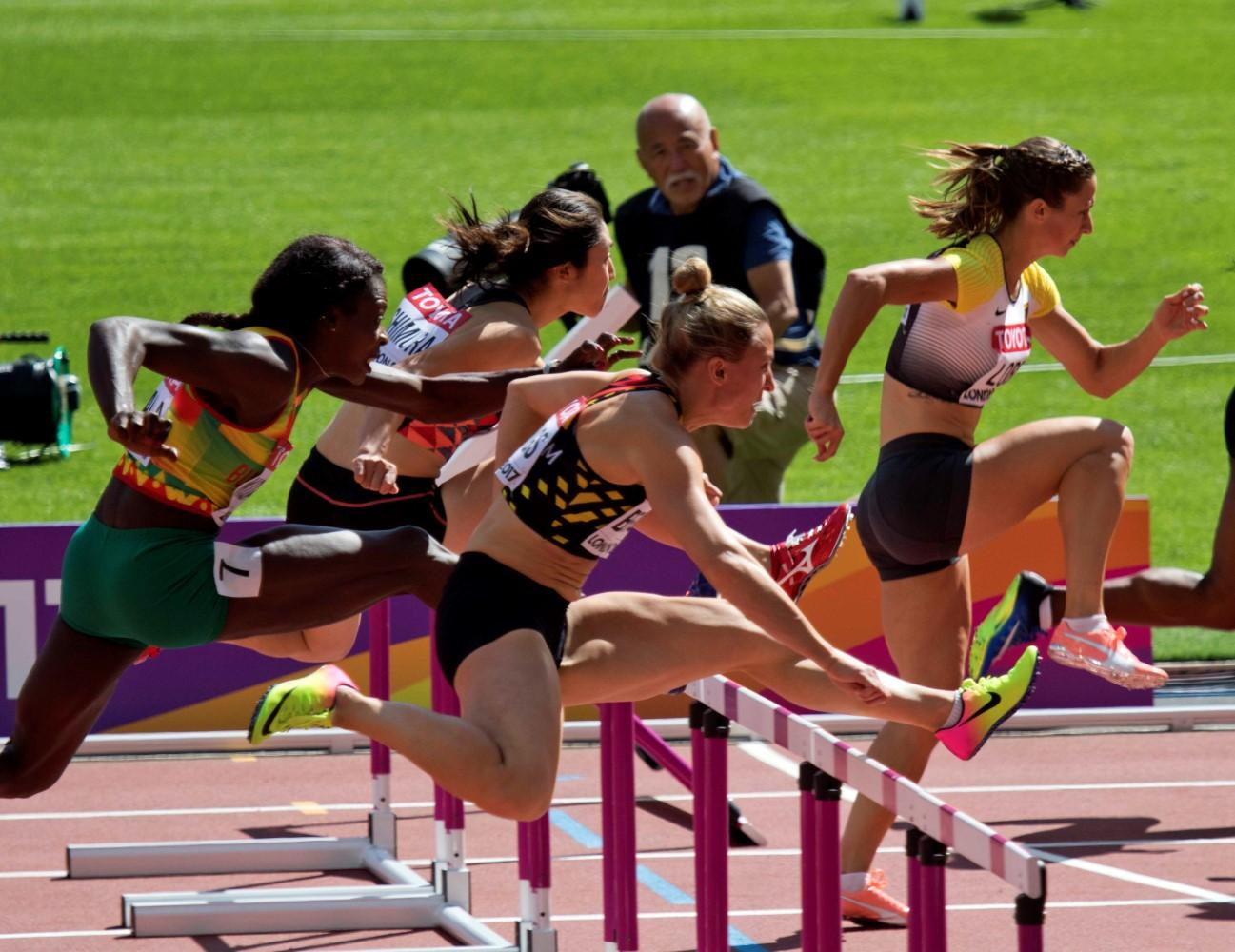 d7_8 100mH berings